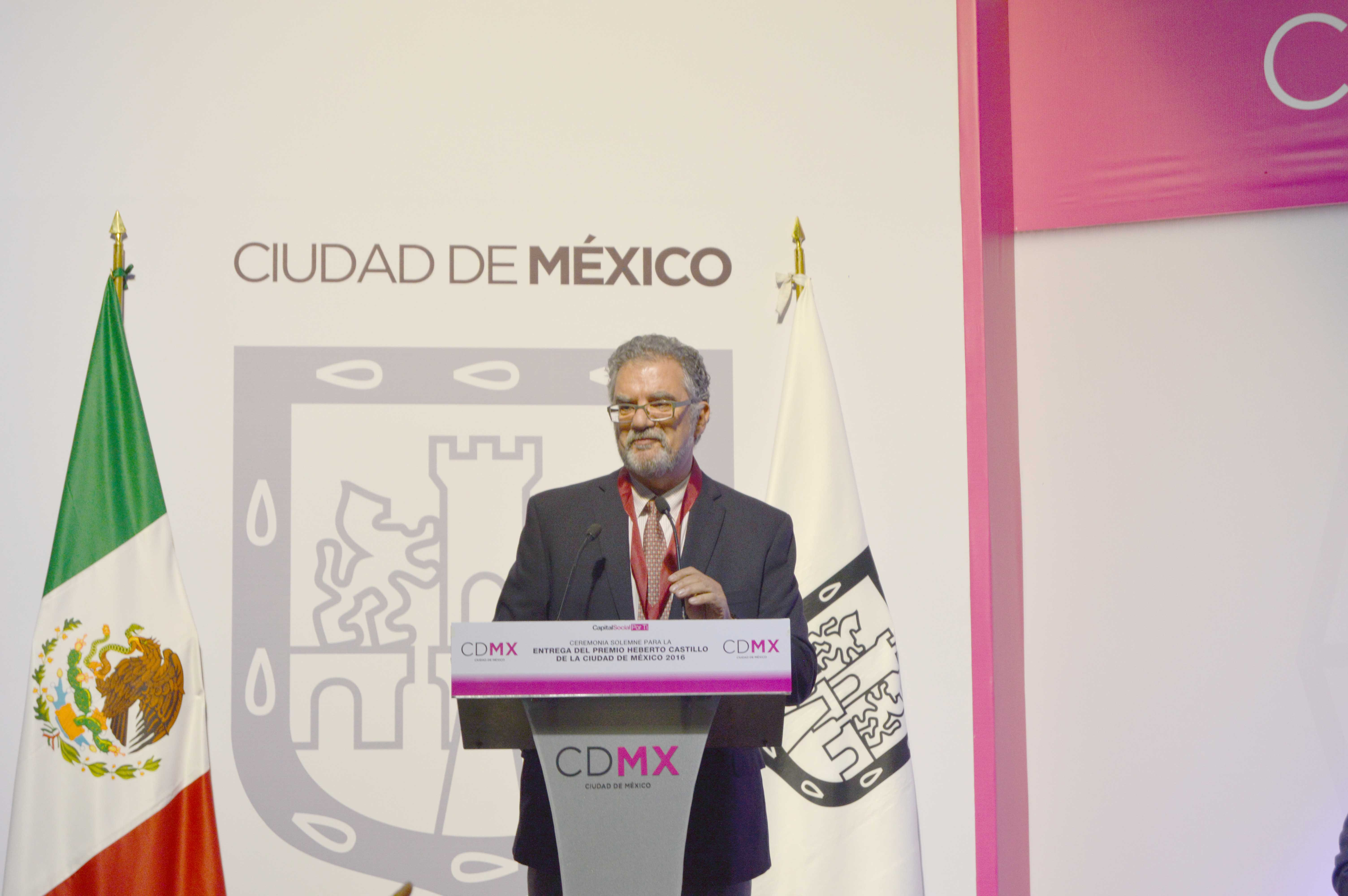 Por sus destacadas aportaciones científicas en el campo de las enfermedades respiratorias en el país, el doctor Moisés Selman Lama, investigador del Instituto Nacional de Enfermedades Respiratorias (INER), recibió el Premio Heberto Castillo de la Ciudad de México 2016 "Por una Ciudad ConCiencia".